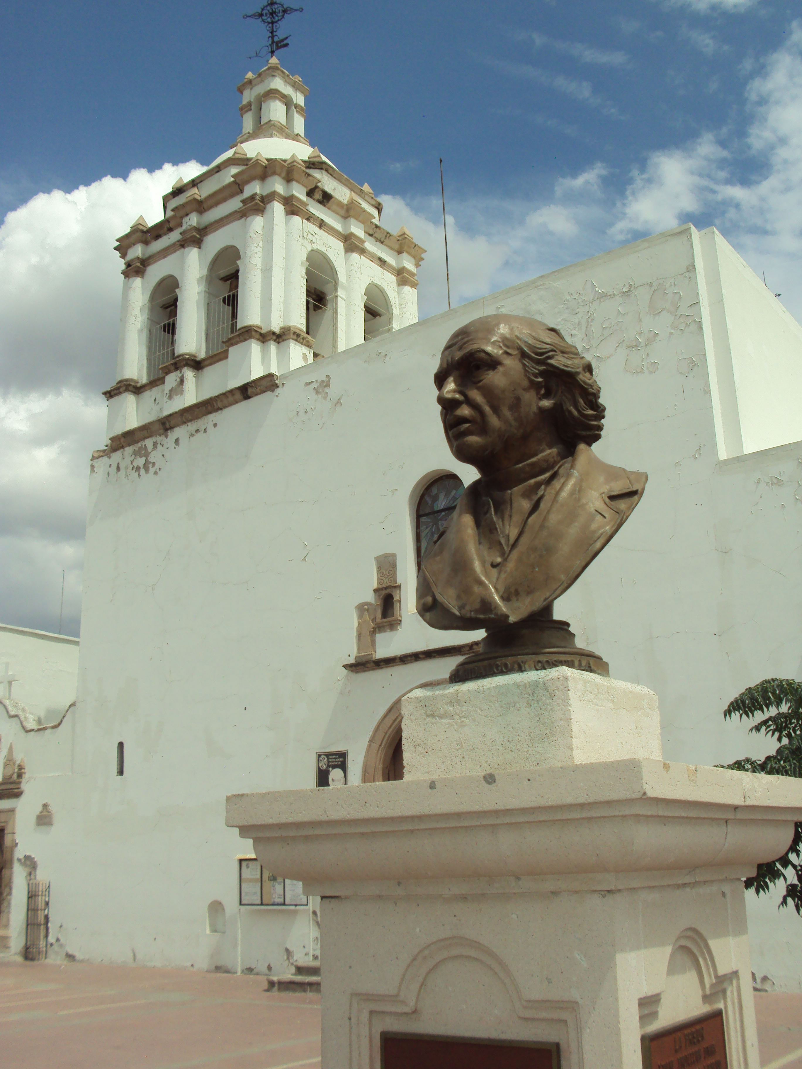 Templo de San Francisco en Chihuahua, Chihuahua, en primer plano, monumento a Miguel Hidalgo, cuyo cuerpo decapitado fue sepultado en dicho templo en 1811